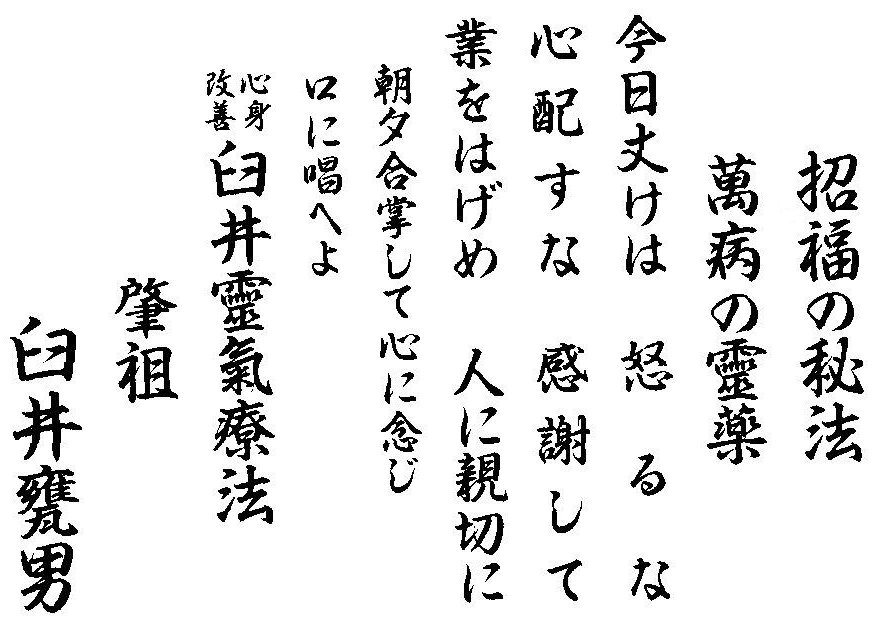 Reikiregels van Usui.